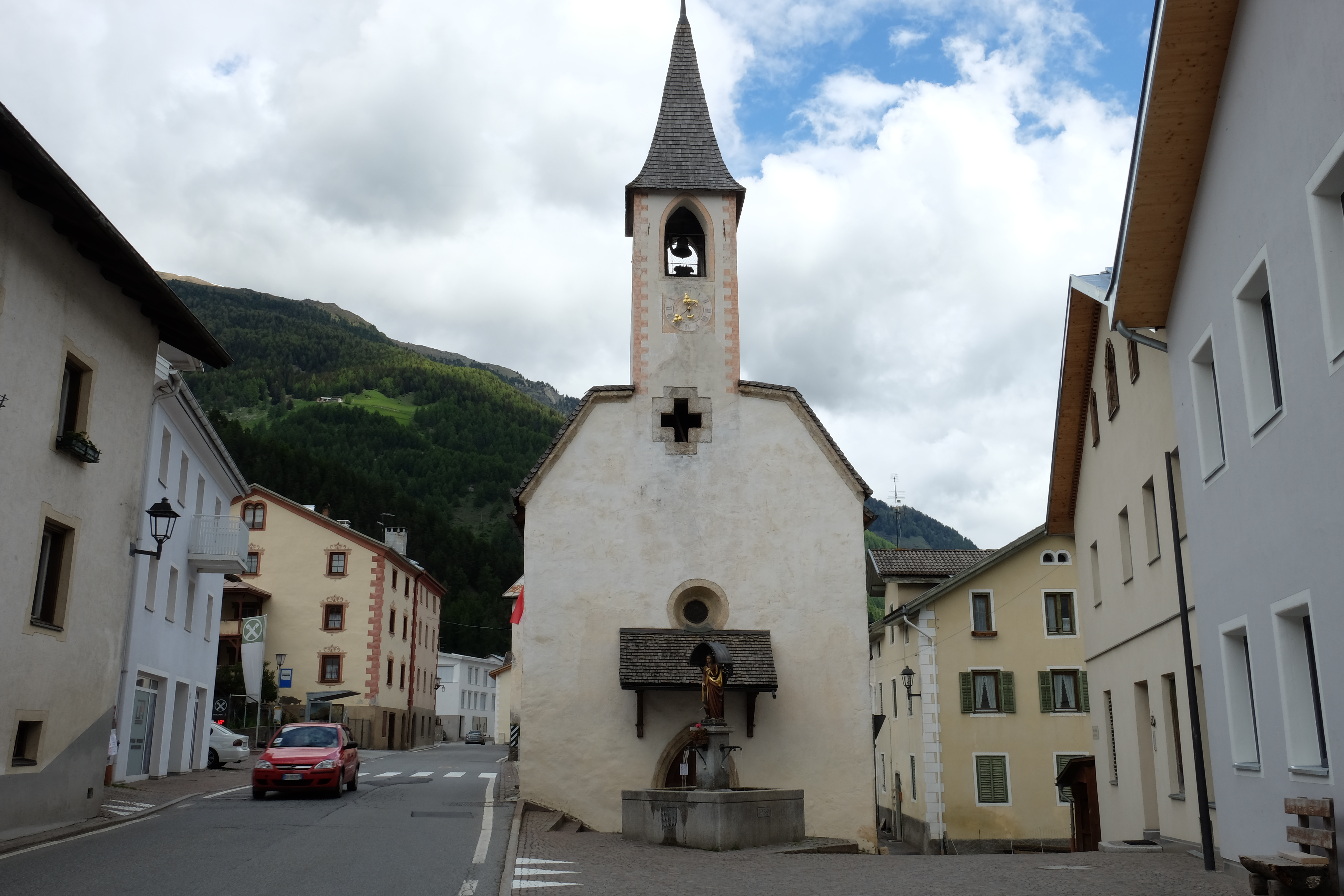 St. Nikolaus in Taufers im Münstertal (Südtirol)